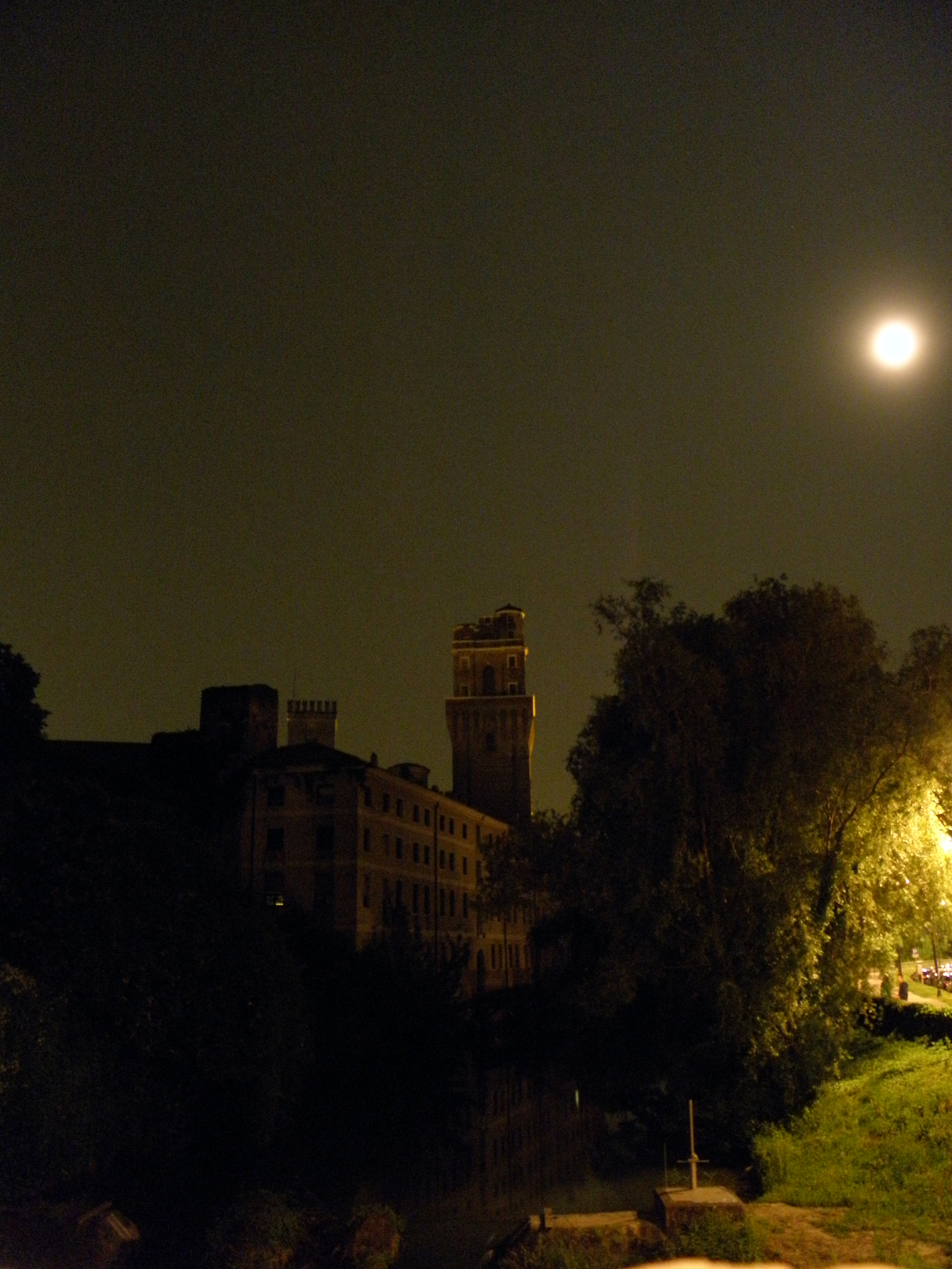 Padova, vista notturna del complesso della Specola con luna sulla destra.